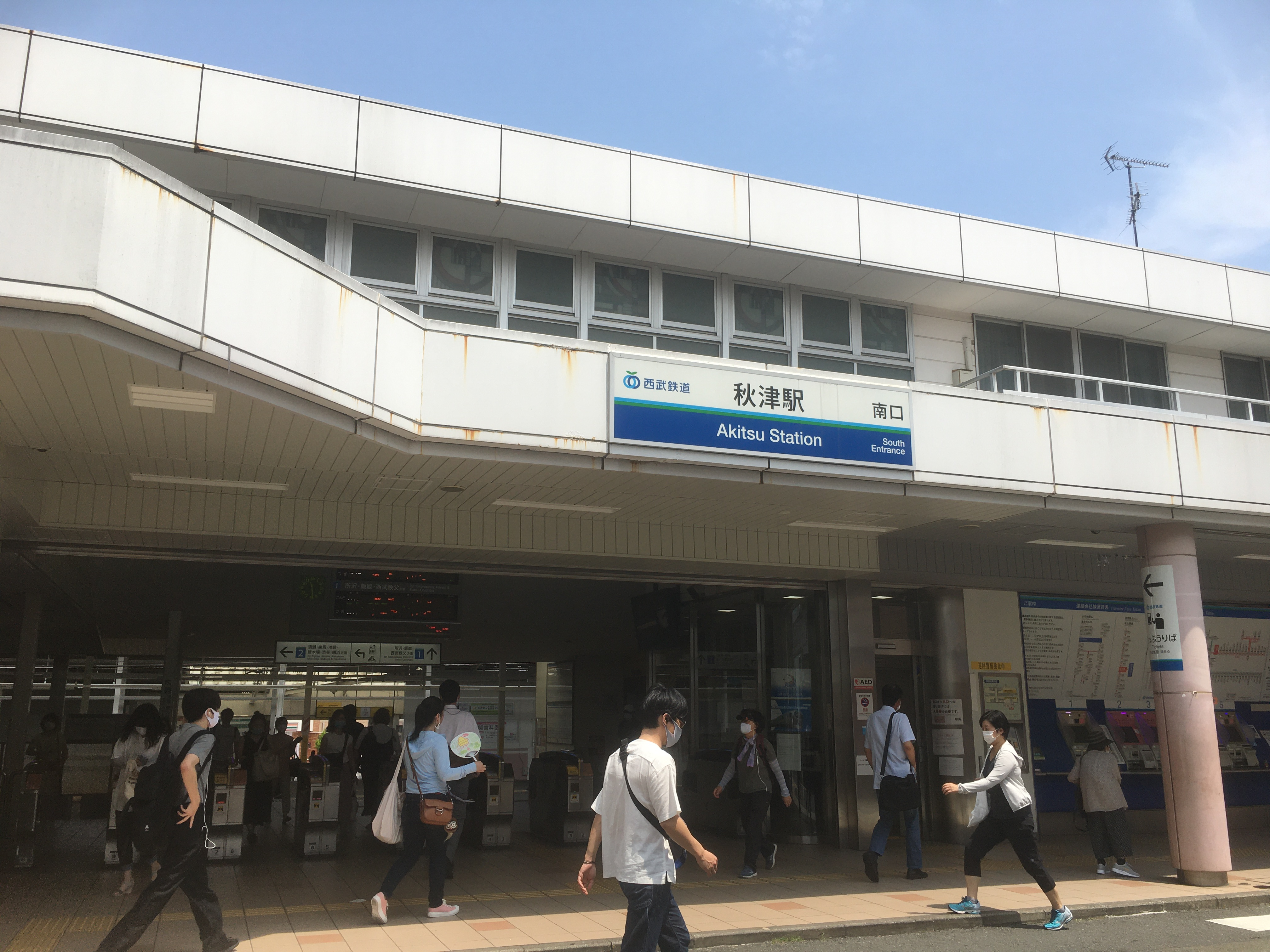 秋津駅 (Akitsu Station)